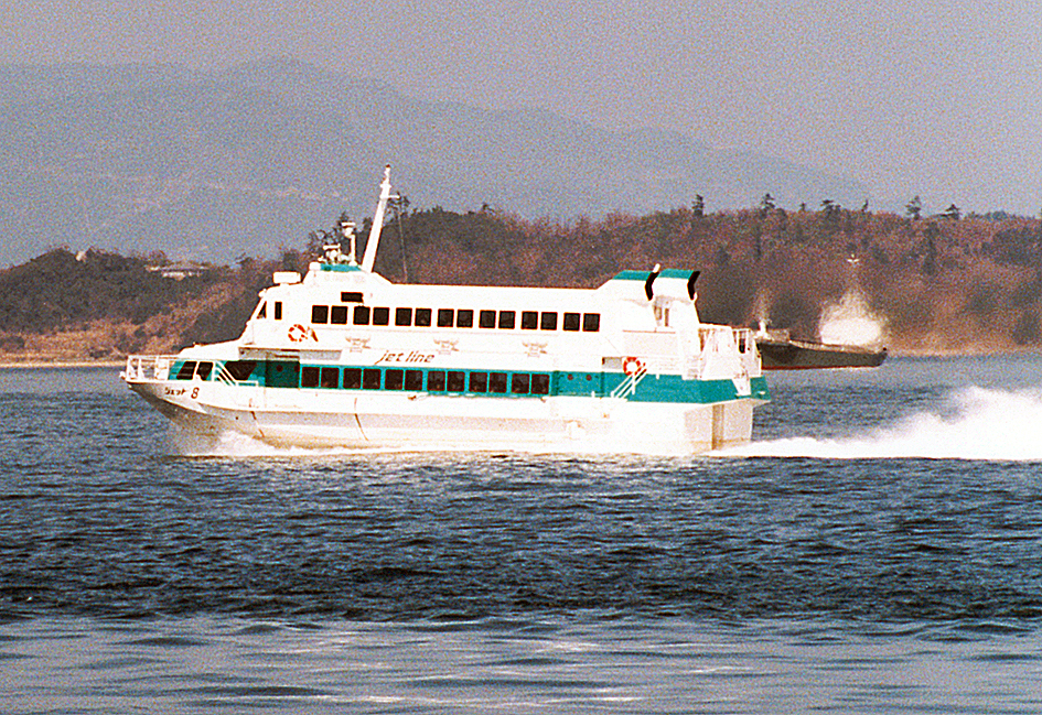 関西汽船 ジェット8 ボーイング929